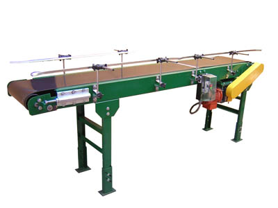 belt conveyor, 400 x 300 /image in jpg